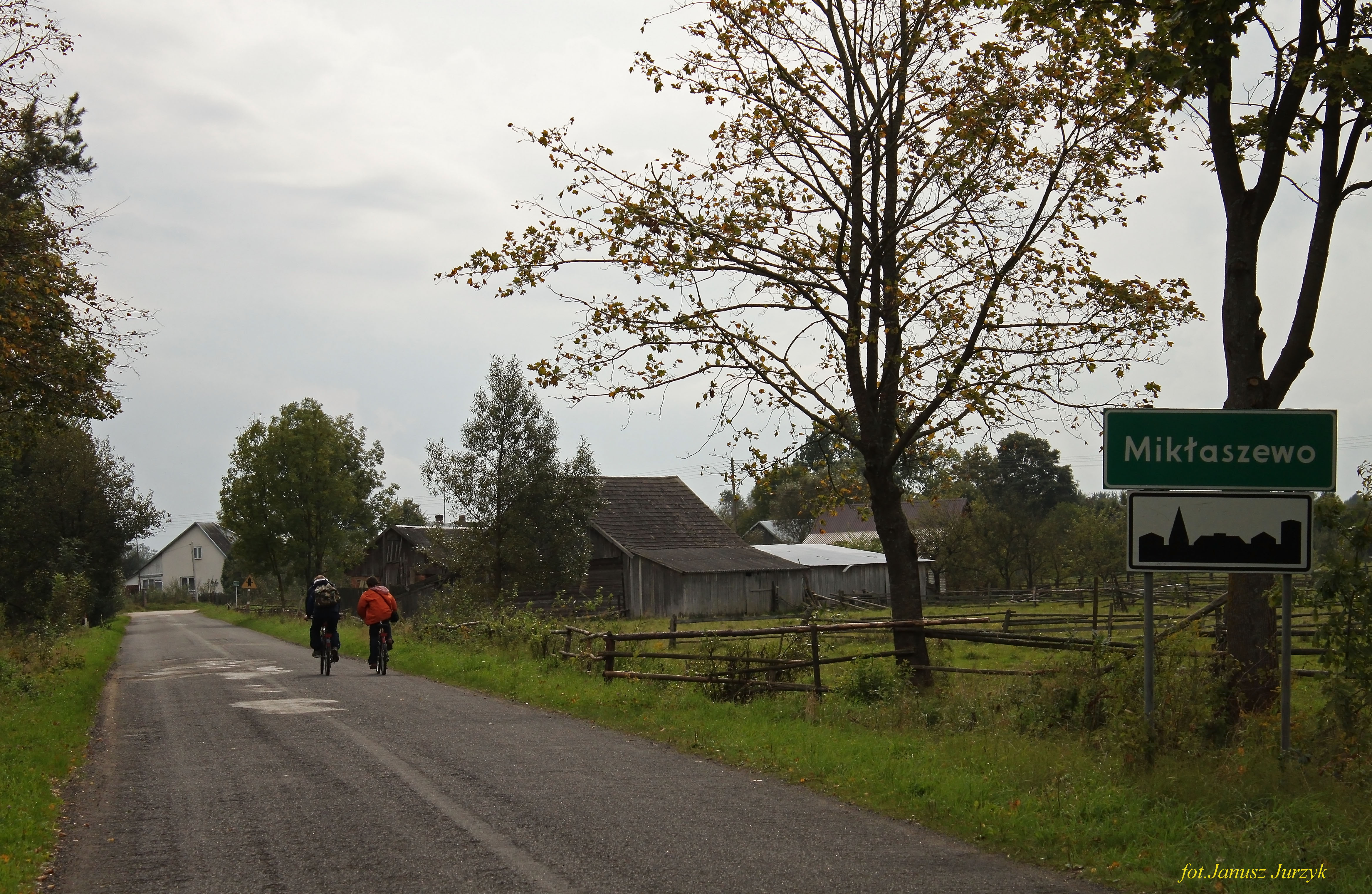 Mikłaszewo